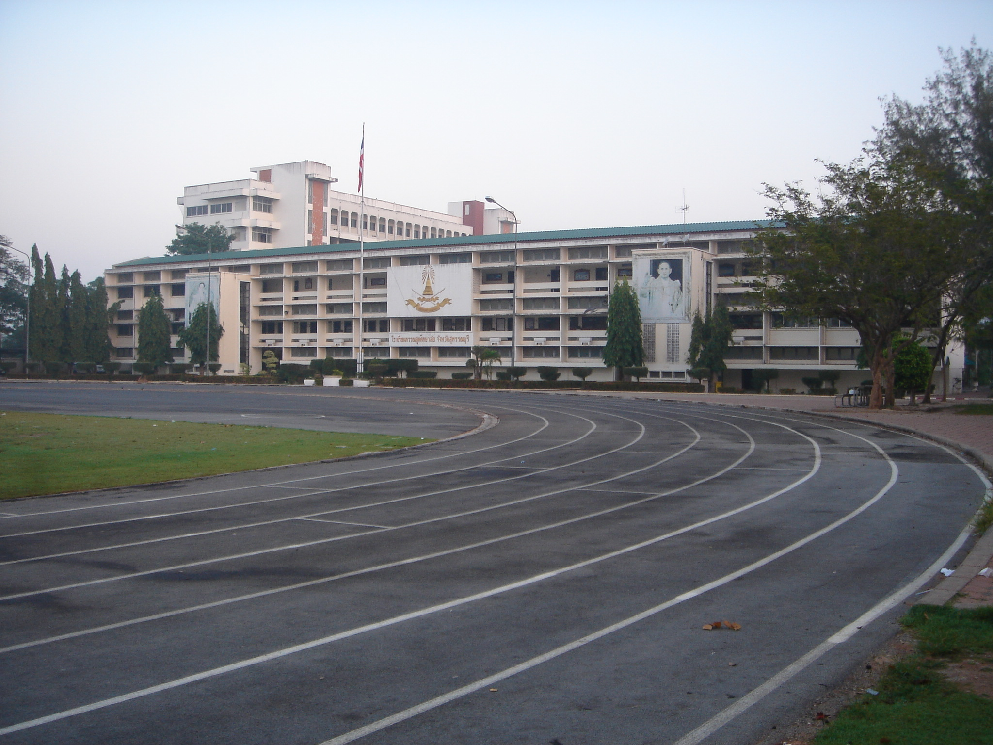 อาคาร1